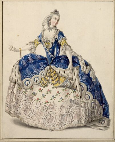 Vestiario del Solimano Opera 4. Die Sopranistin und Primadonna Teresa Albuzzi-Todeschini als Narsea 24-teiliger Zyklus (inklusive Titelblatt) Zeichnung / Feder in Grau und Braun, Graulavierungen, aquarelliert ANMERKUNG: Die Original-Beschreibung auf der Albertina ist offensichtlich falsch. Tamiri ist eine Rolle zb aus der Oper Semiramide riconosciuta, die zwar auch von Hasse für Dresden vertont wurde, allerdings schon am 11.01.1747 in Dresden erstmals aufgeführt wurde. Zu diesem Zeitpunkt war Frau Albuzzi noch nicht in Dresden engagiert (erst ab 1750).